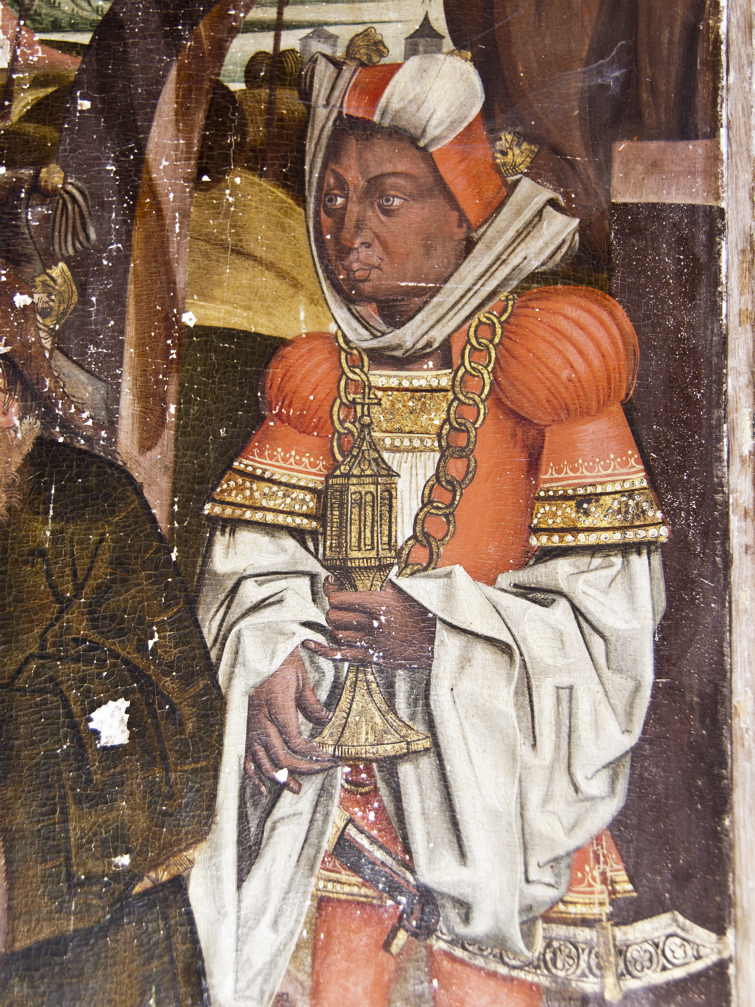 Dorfkirche Bernitt - Tafelmalerei des Flügelaltars (Rückseite). Darstellung der Anbetung der Heiligen drei Könige Detail)